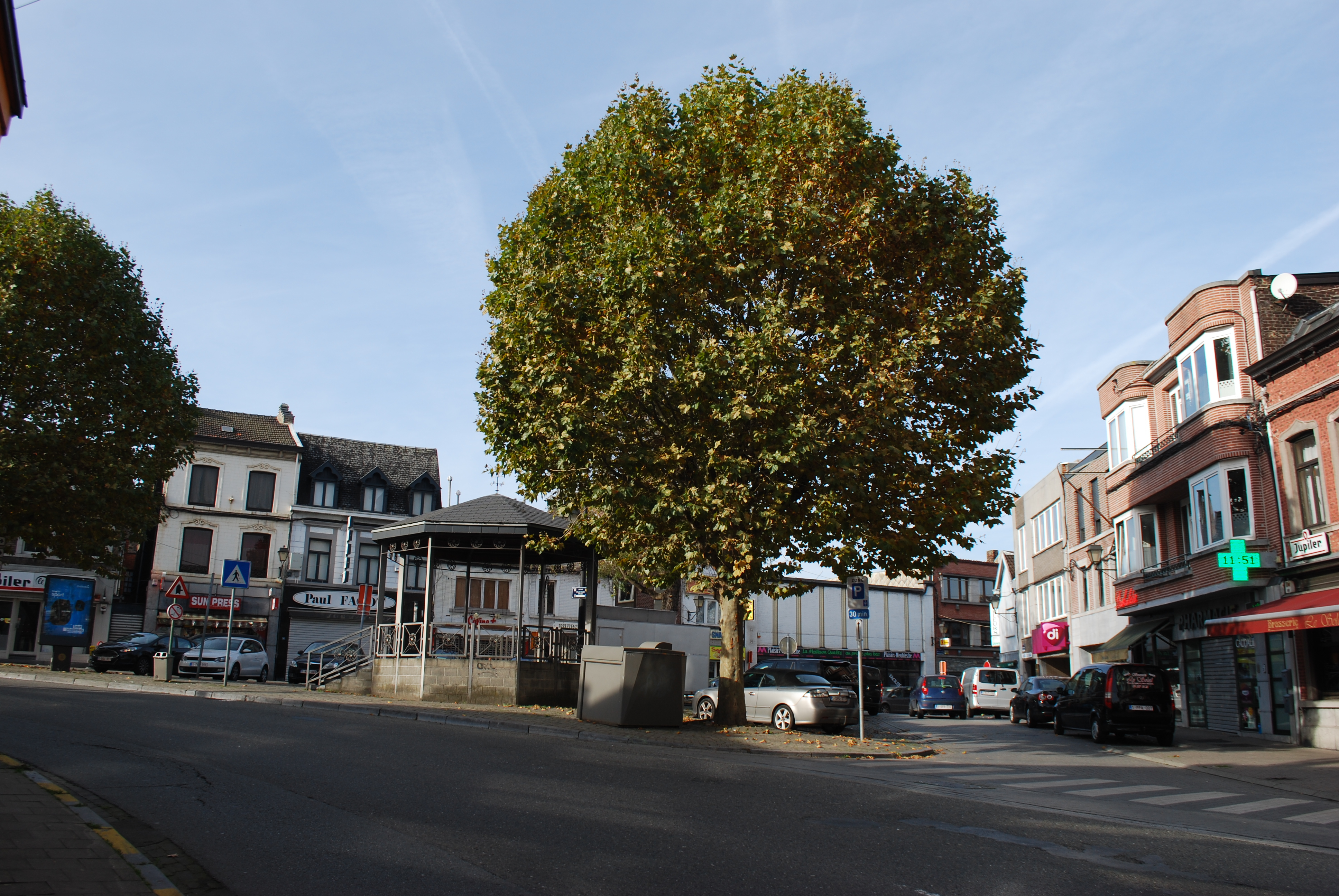 Vue du quartier du Pairay, à Seraing (Belgique).